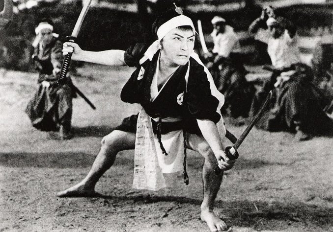 『血煙高田の馬場』、スチル写真、1937年